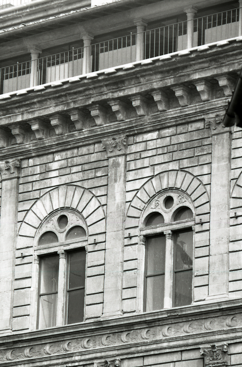 Firenze. Leon Battista Alberti, Palazzo Rucellai: facciata con particolari degli elementi architettonici e decorativi. Servizio fotografico : Firenze, 1972 / Paolo Monti. - Strisce: 6, Fotogrammi complessivi: 35 : Negativo b/n, gelatina bromuro d'argento/ pellicola ; 35 mm. - ((Sul portanegativi: NIKMAT FP4. - All'interno del portanegativi: la serie è anche identificata da una linea orizzontale a pennarello nero che separa la suddetta serie dalla successiva di soggetto diverso. - Occasione: Documentazione per la pubblicazione: Pica Agnoldomenico (a cura di), "Celebrazioni di Leon Battista Alberti, 1404-1472", catalogo della mostra, Roma 1972, Roma, Accademia nazionale di San Luca, 1972. - Fonte: Agenda di Paolo Monti: Leica 1501-3000 Controllo numerazione (1950-1978), presso Archivio Paolo Monti. - Fonte: Fattura di Paolo Monti: IV. Commesse/ fattura n. 39 (1972/12/21), presso Archivio Paolo Monti. - Fonte: Monografia di Borsi, Franco: Leon Battista Alberti, Milano, Electa (1975)